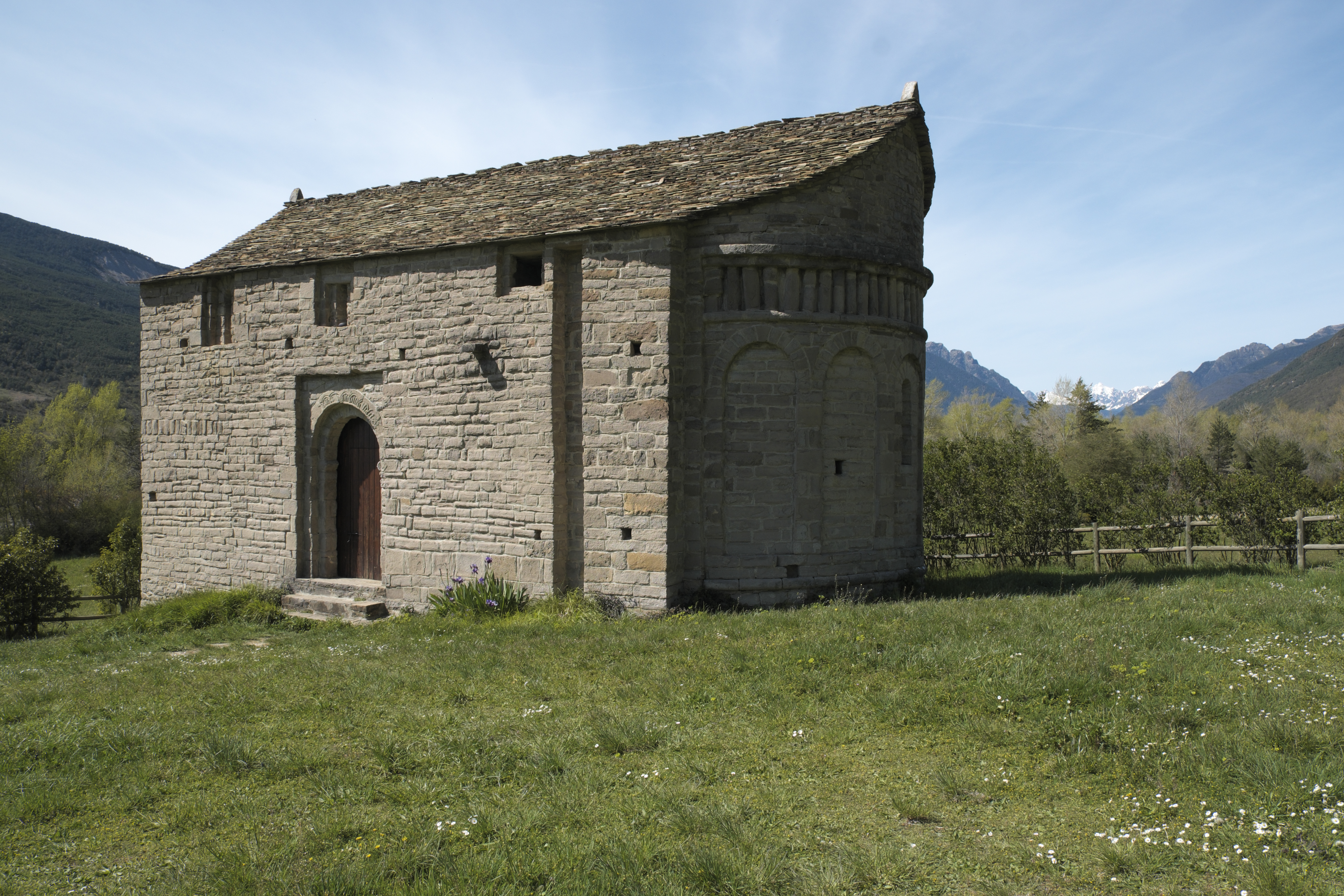 Kirche San Juan de Busa in der Gemeinde Biescas, zwischen Oliván und Lárrede, in der Provinz Huesca (Aragón/Spanien)